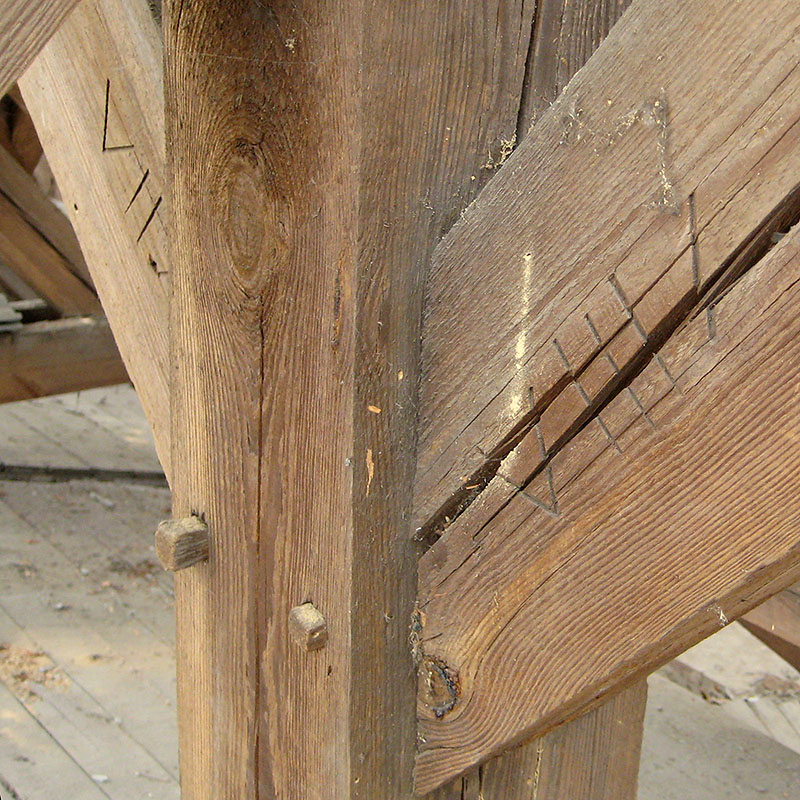 Abbundzeichen in einer Dachkonstruktion (Ende 19./Anfang 20. Jahrhundert)